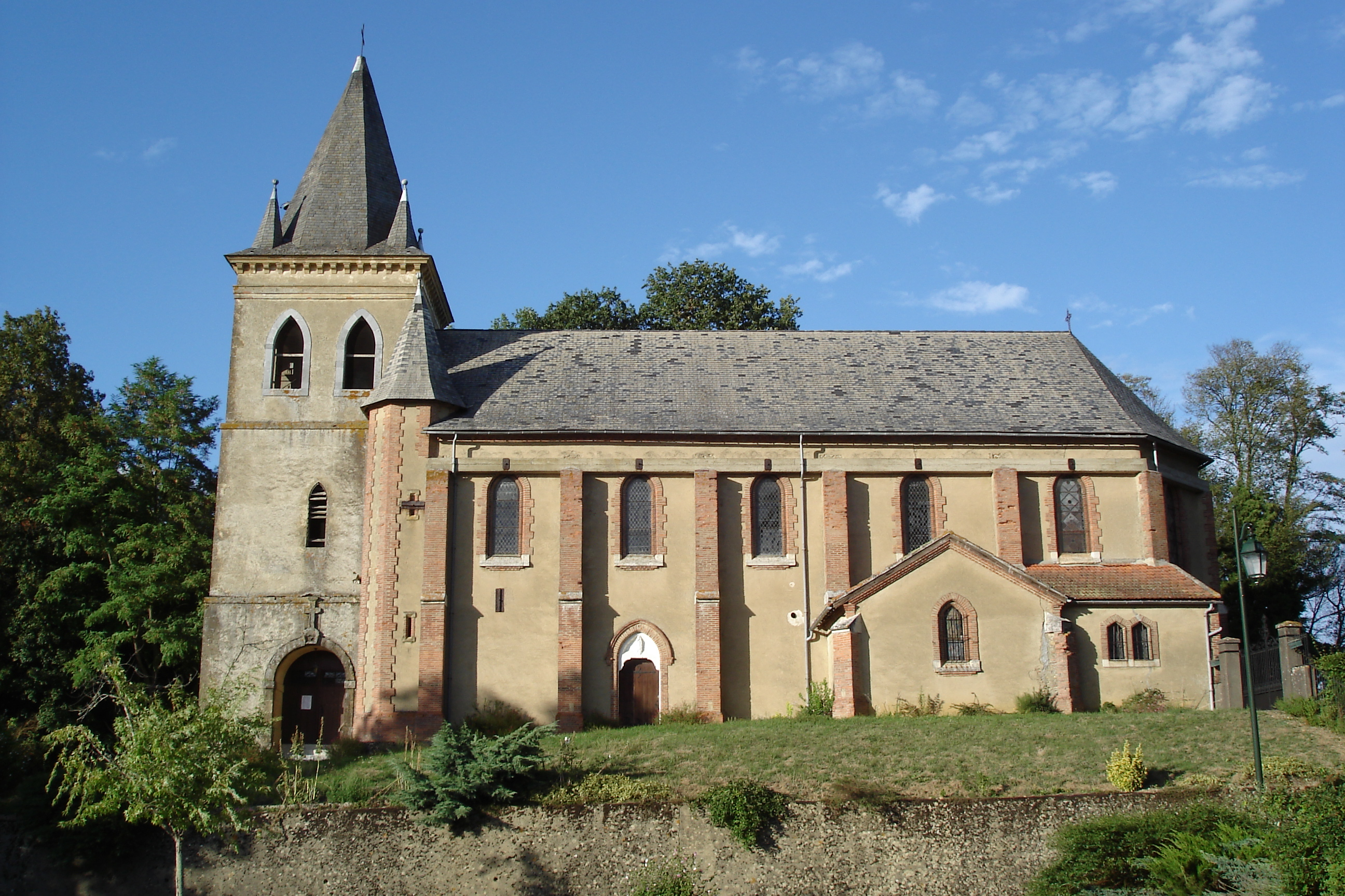 Eglise de Sombrun. Sombrun. Hautes-Pyrénées . France.